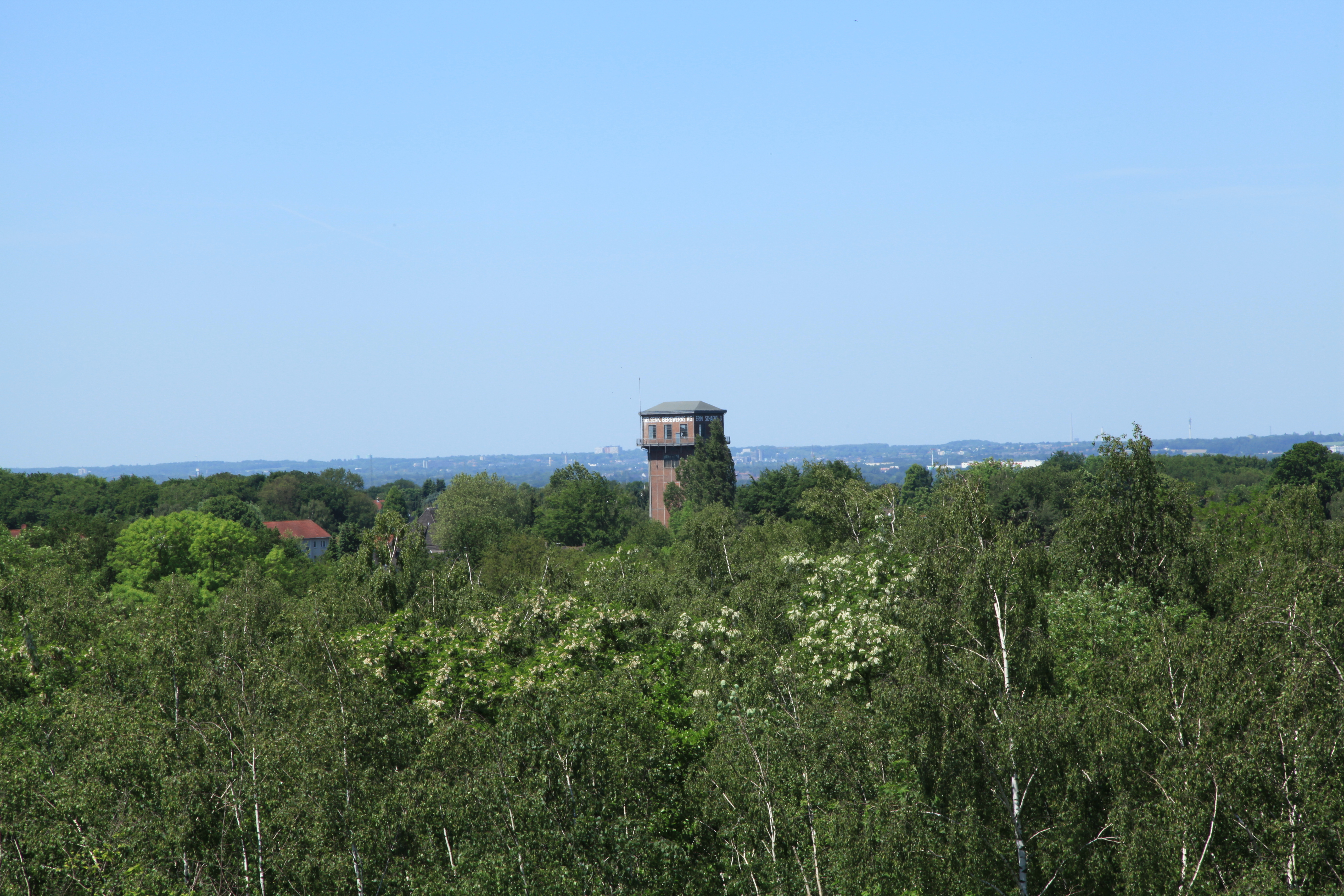 Blick von der Halde Schwerin auf Zeche Erin Schacht 3 an der Bodelschwingher Straße in Castrop-Rauxel